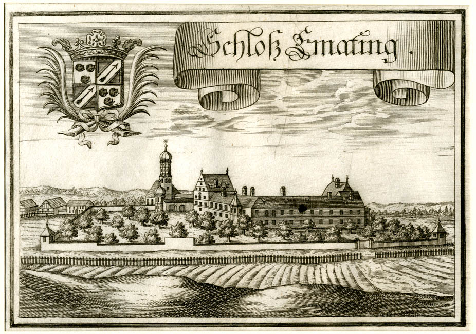 “Schloß Emating” (Schloß Egmating bei Glonn), Aus : Beschreibung des Churfürsten- u. Hertzogthumbs Ober- und Nidern Bayrn. Rentamt Münchenm, Gericht Markt Schwaben, 1701